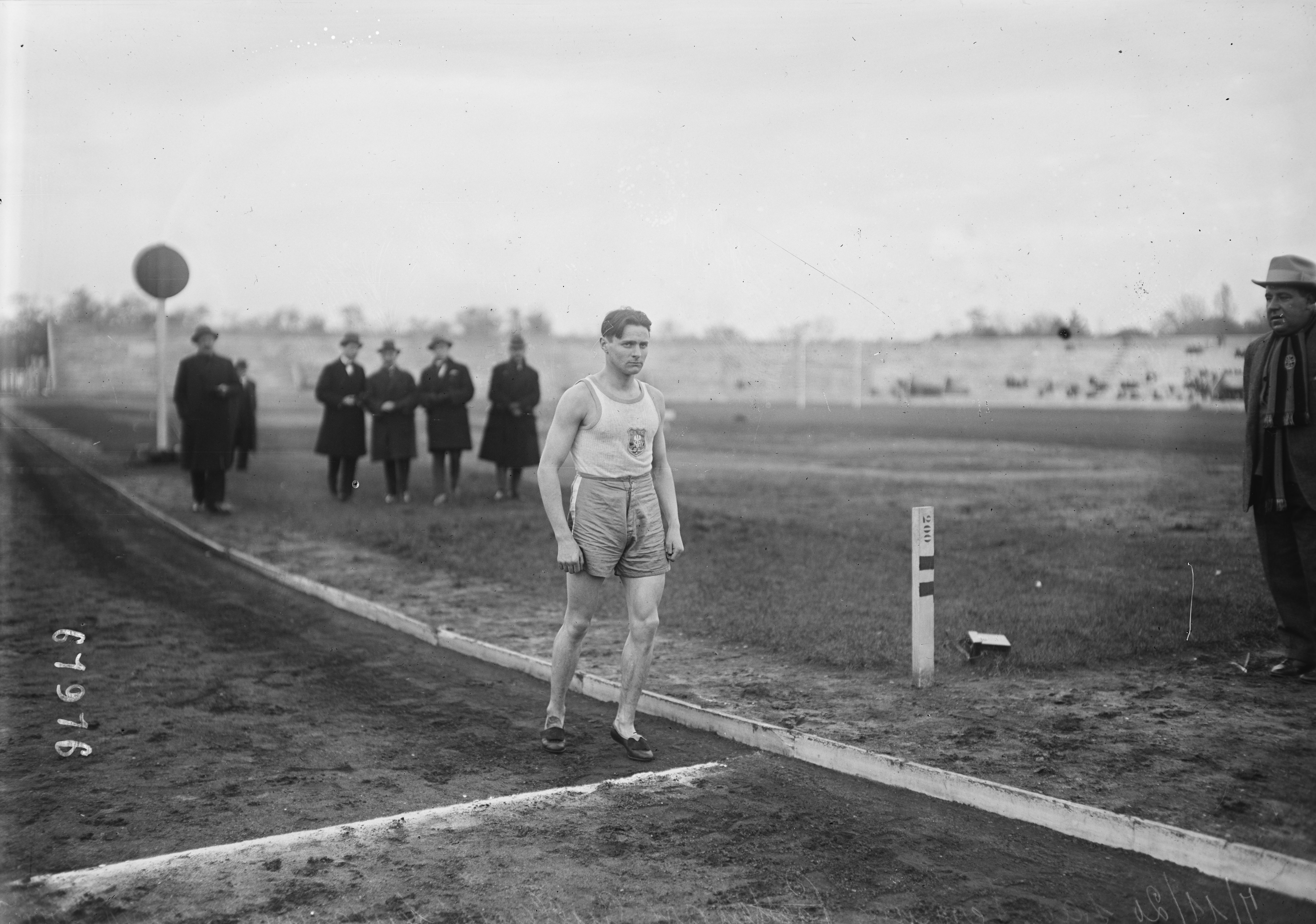 7/11/20, stade Pershing, Joseph Guillemot au départ de sa tentative de record du 3000 m.